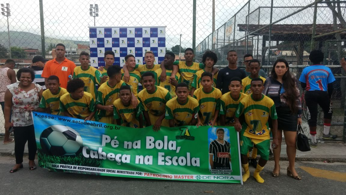 Equipe do 7 de Abril perfilada.